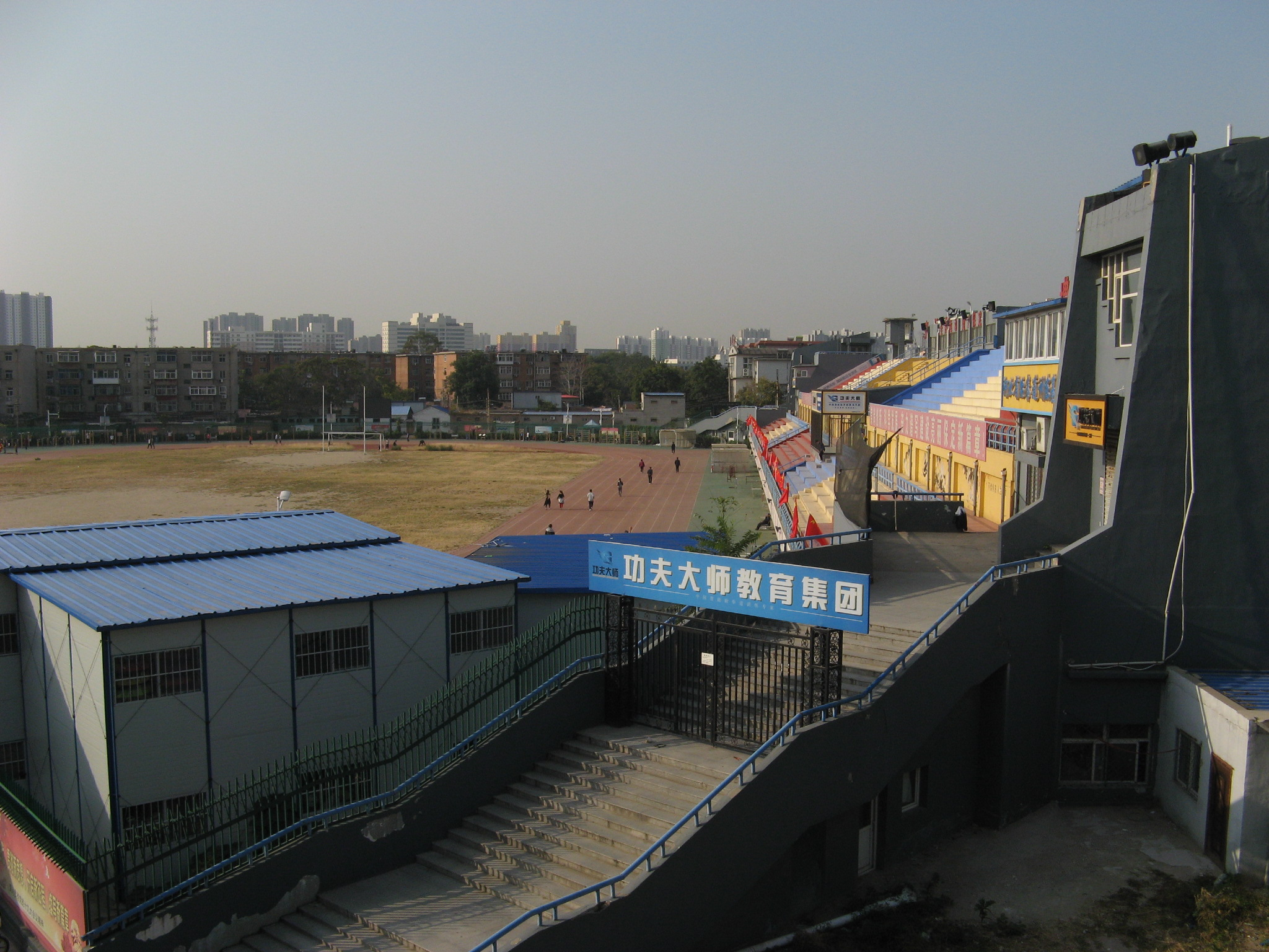 中华人民共和国河北省保定市，保定市人民体育场